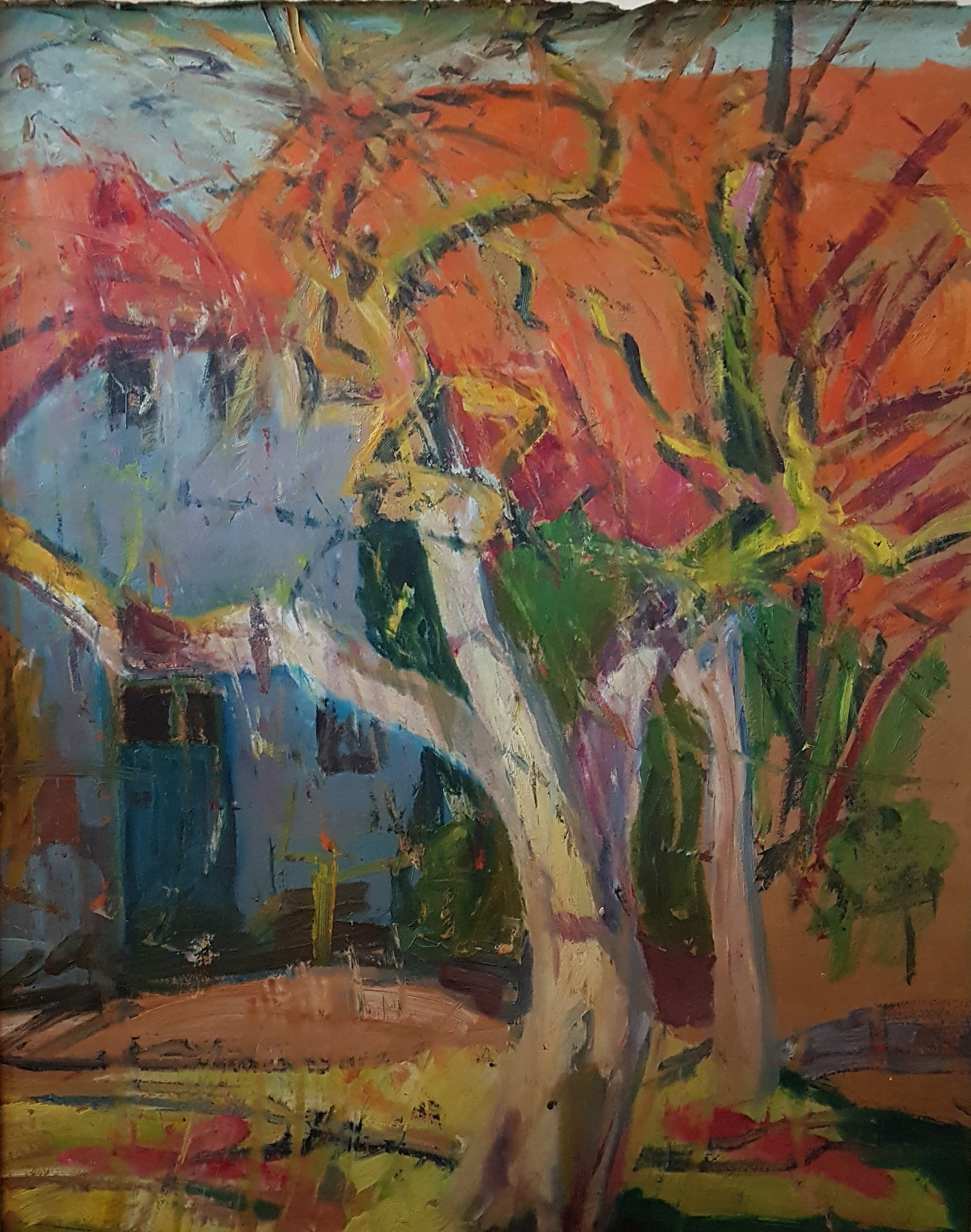 Hus i Worpswede. Framsidan av en pannå med två målningar. Oljemålning på kartong av Albert Schiestl-Arding, 1920-tal.